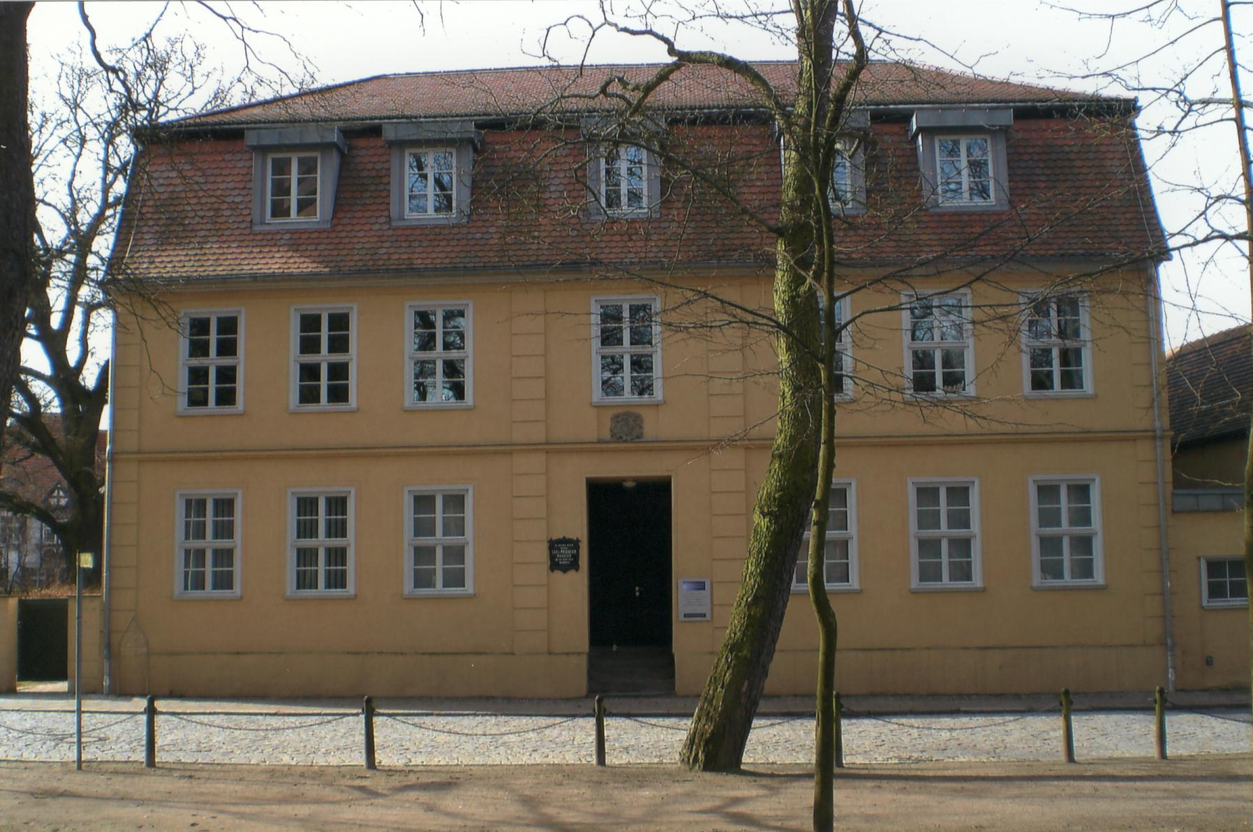 Stendal, Am Dom 13, Geburtshaus des Karl Friedrich Friccius